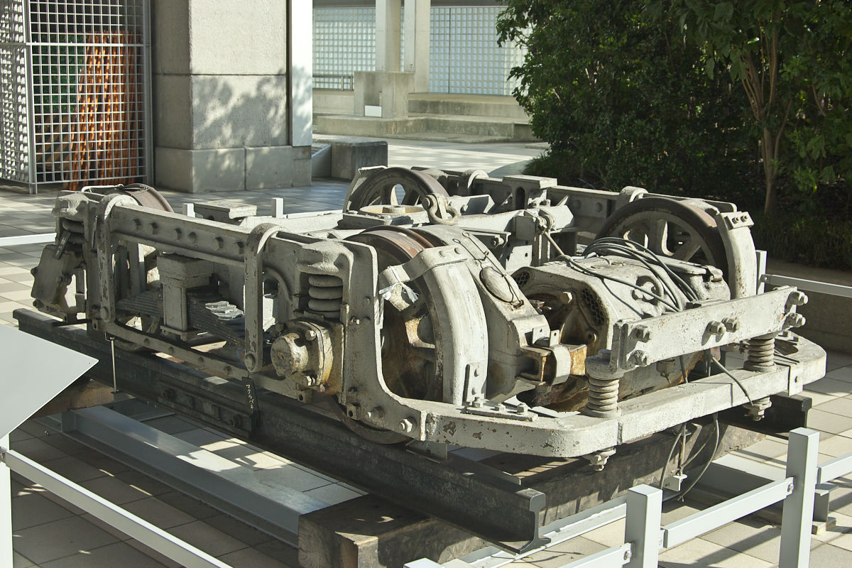 江戸東京博物館の前庭に保存されている都電4000形のD11形台車。大正期に製造された初期の国産鋳鋼枠台車。